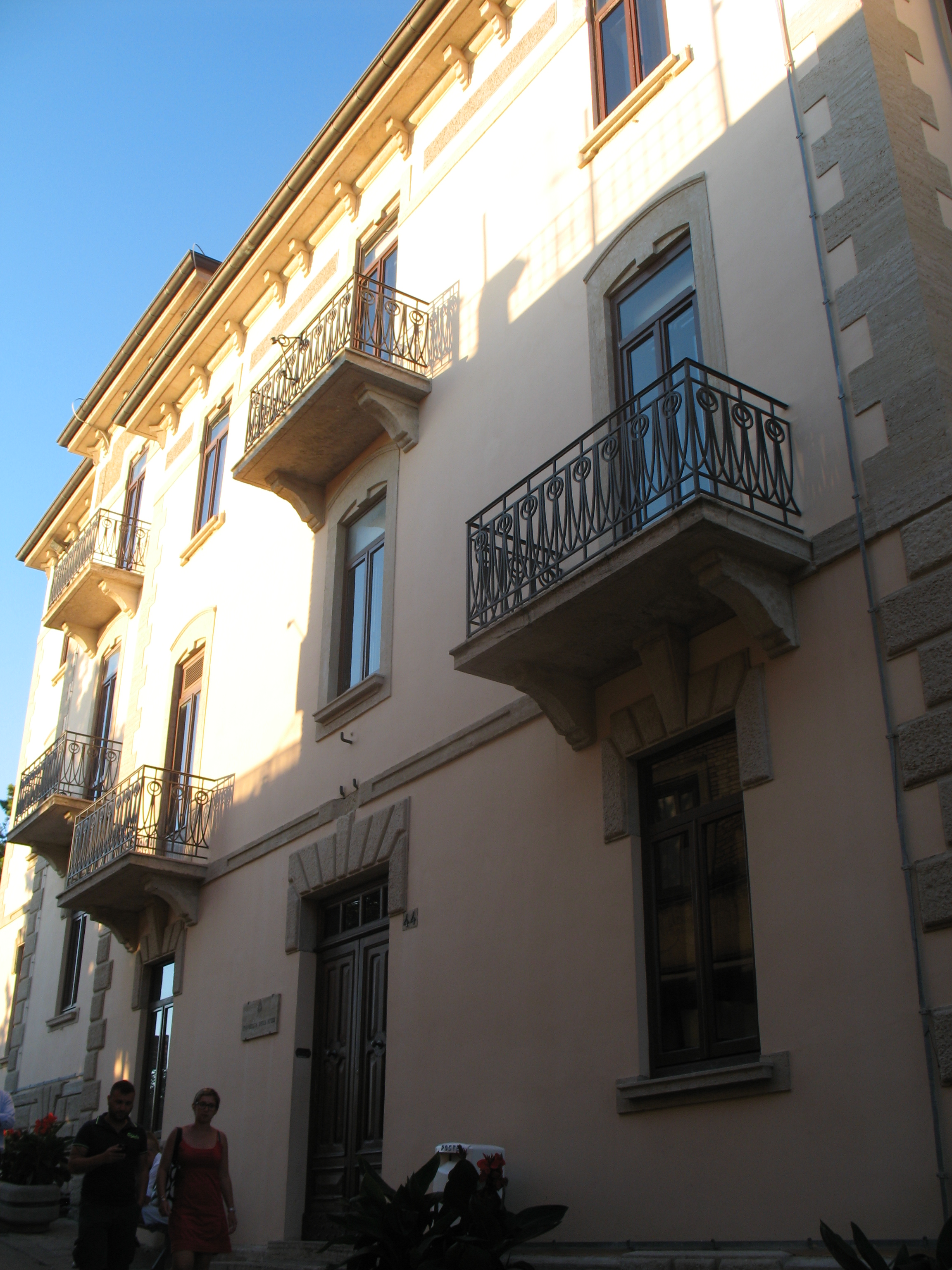 Sede dell'Università degli Studi della Repubblica di San Marino nel centro storico di San Marino città